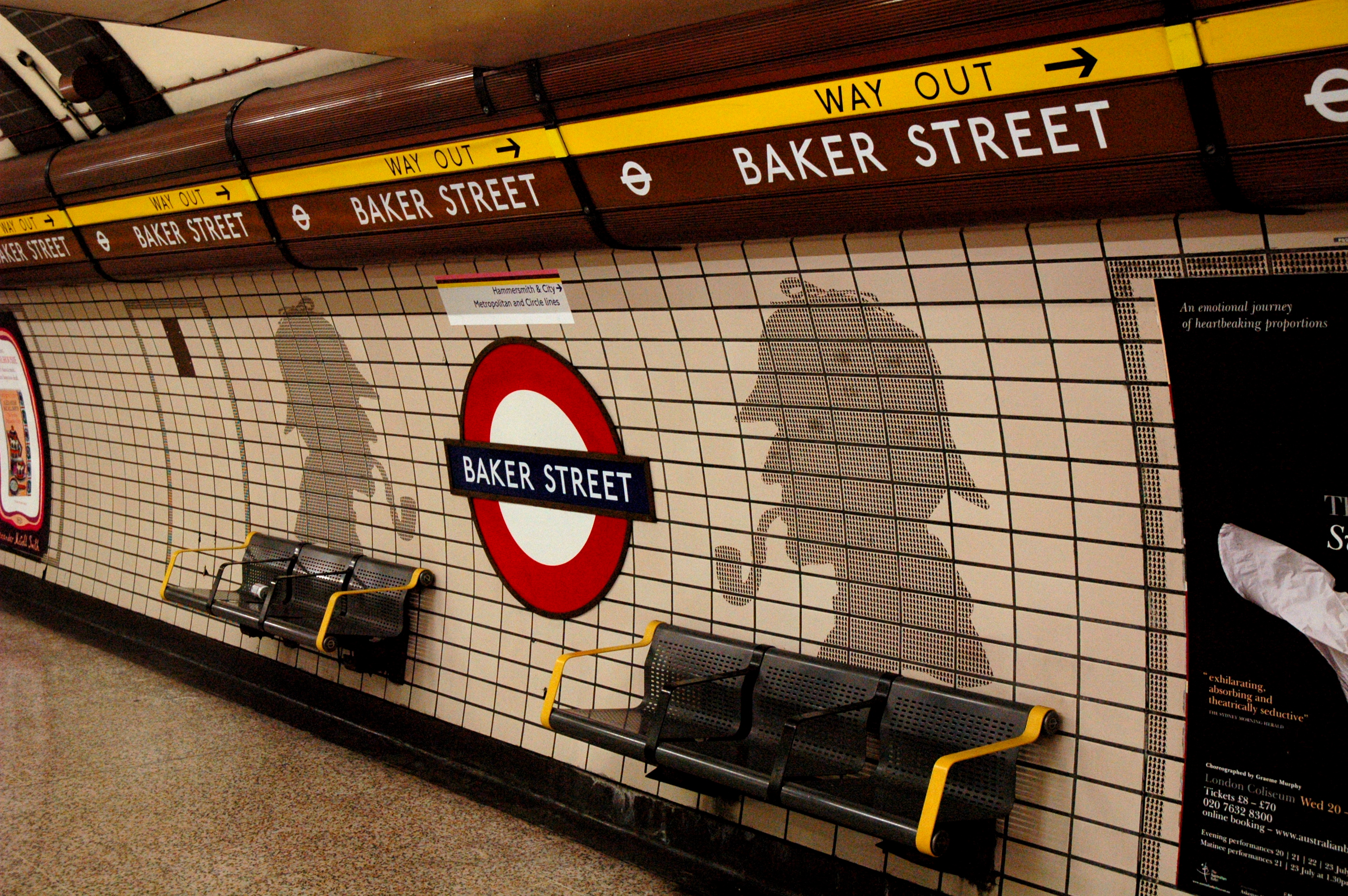 Baker Street (Bakerloo)